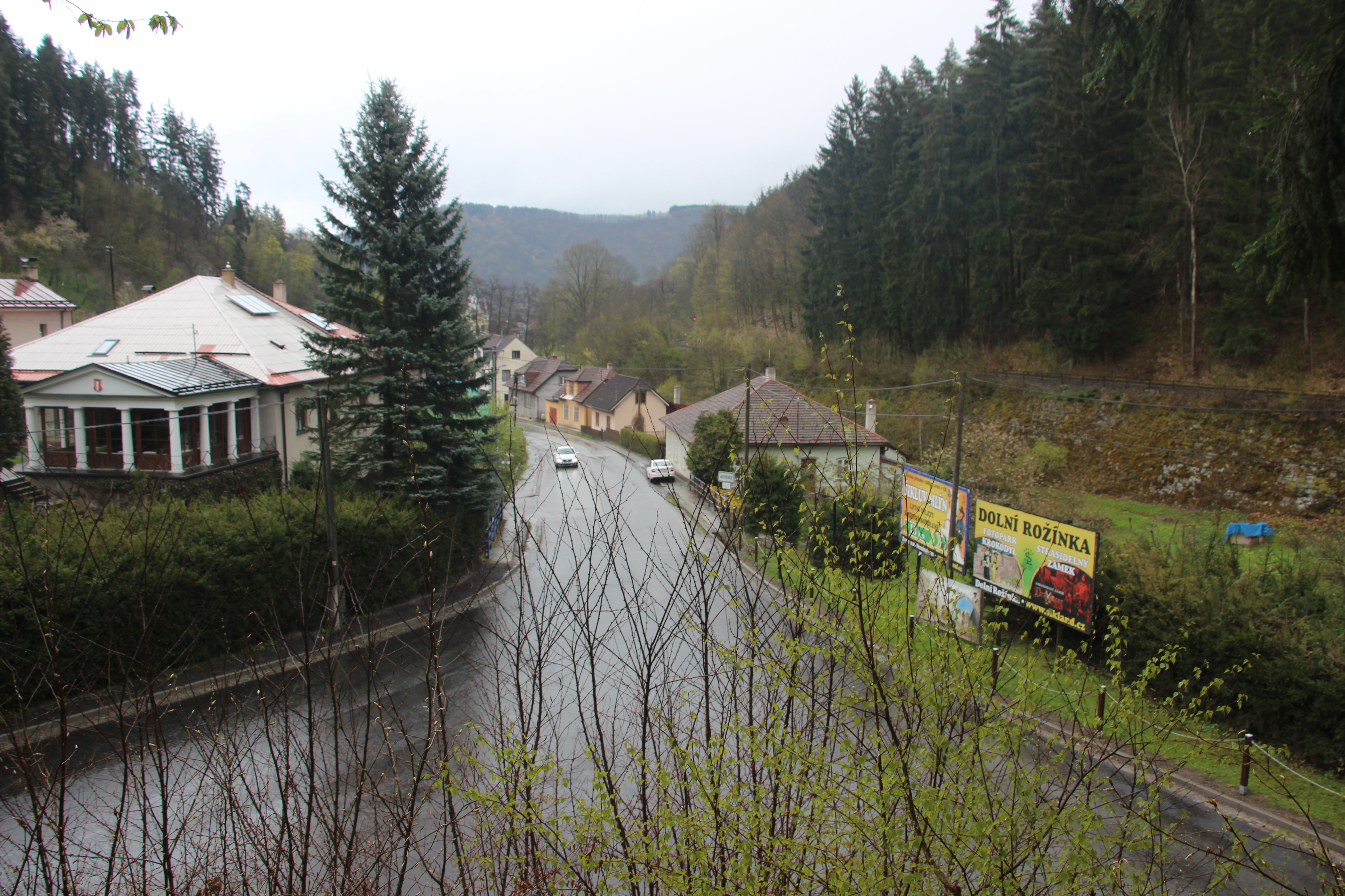 Nedvědice, část Pernštejn, domy na východním okraji katastru (přiléhající ke katastru Nedvědice pod Pernštejnem). Pohled z naučné stezky.